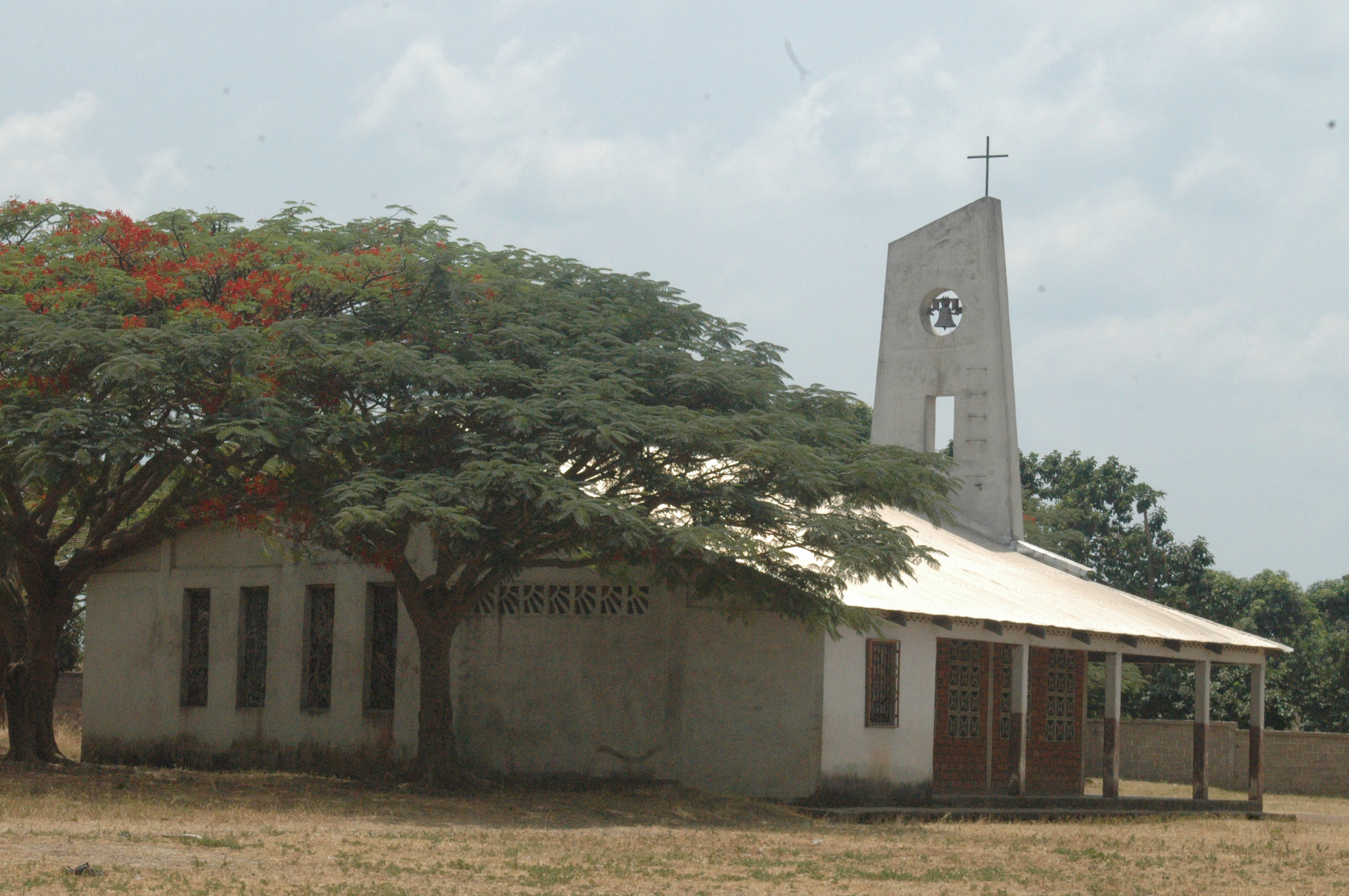 Eglise catholique du village de Niem (diocèse de Bouar), dans le nord-ouest de la République Centrafricaine.